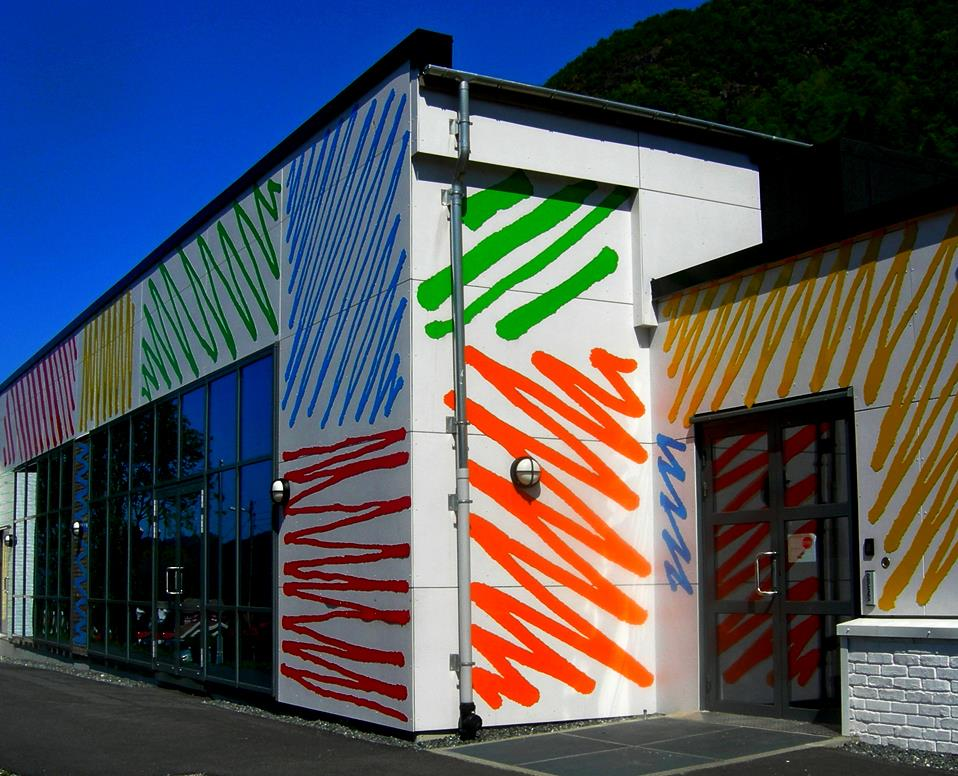 Ådnamarka skole - fasade - blyantstreker utsmykket av kunstner, Sveinung Unneland